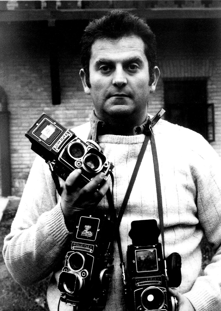 Srpski (latinica): Mirko Lovrić, fotograf